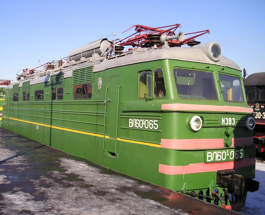 Electric locomotive VL60